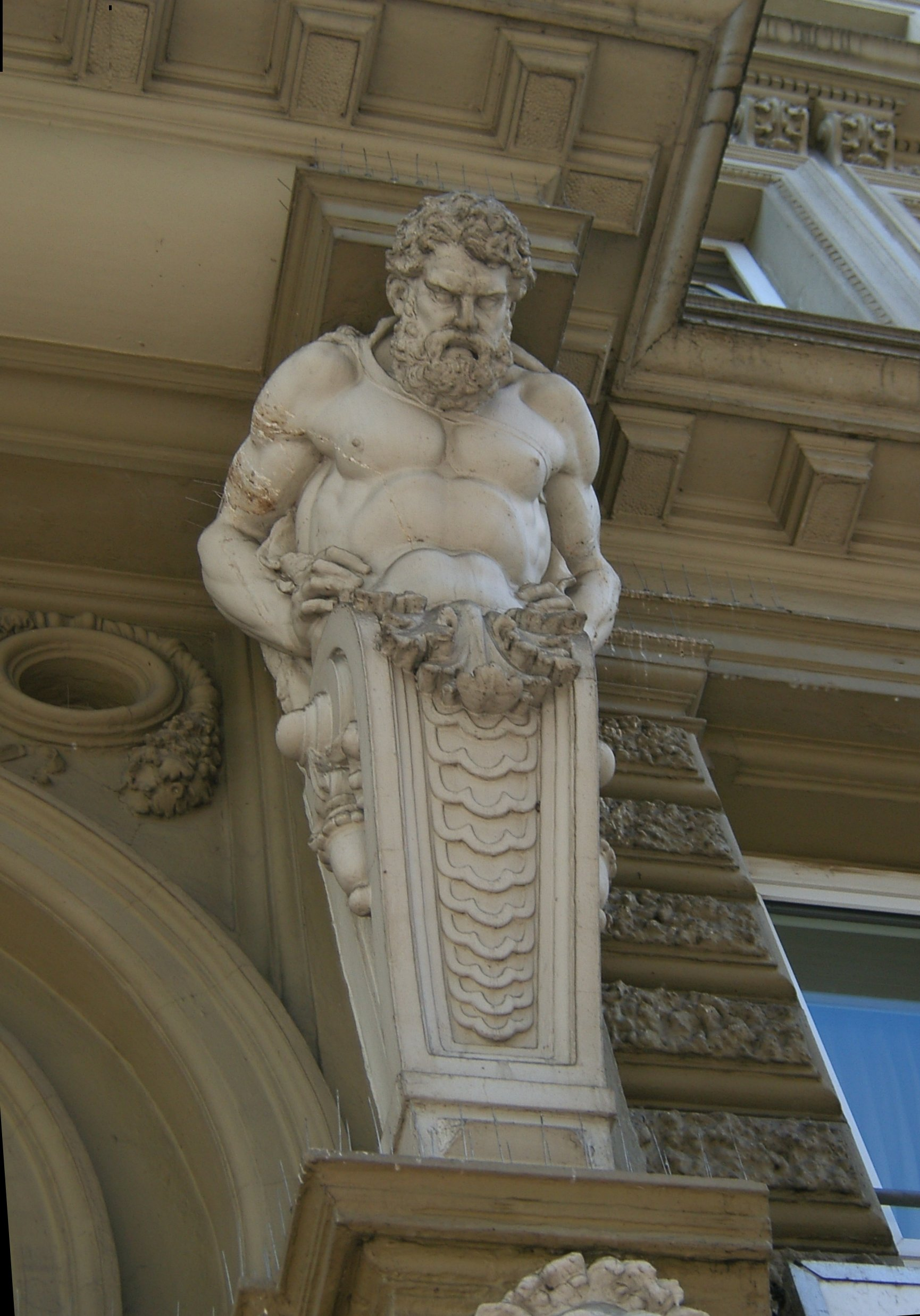 Atlasfigur an einem Haus in der Langen Reihe in St. Georg